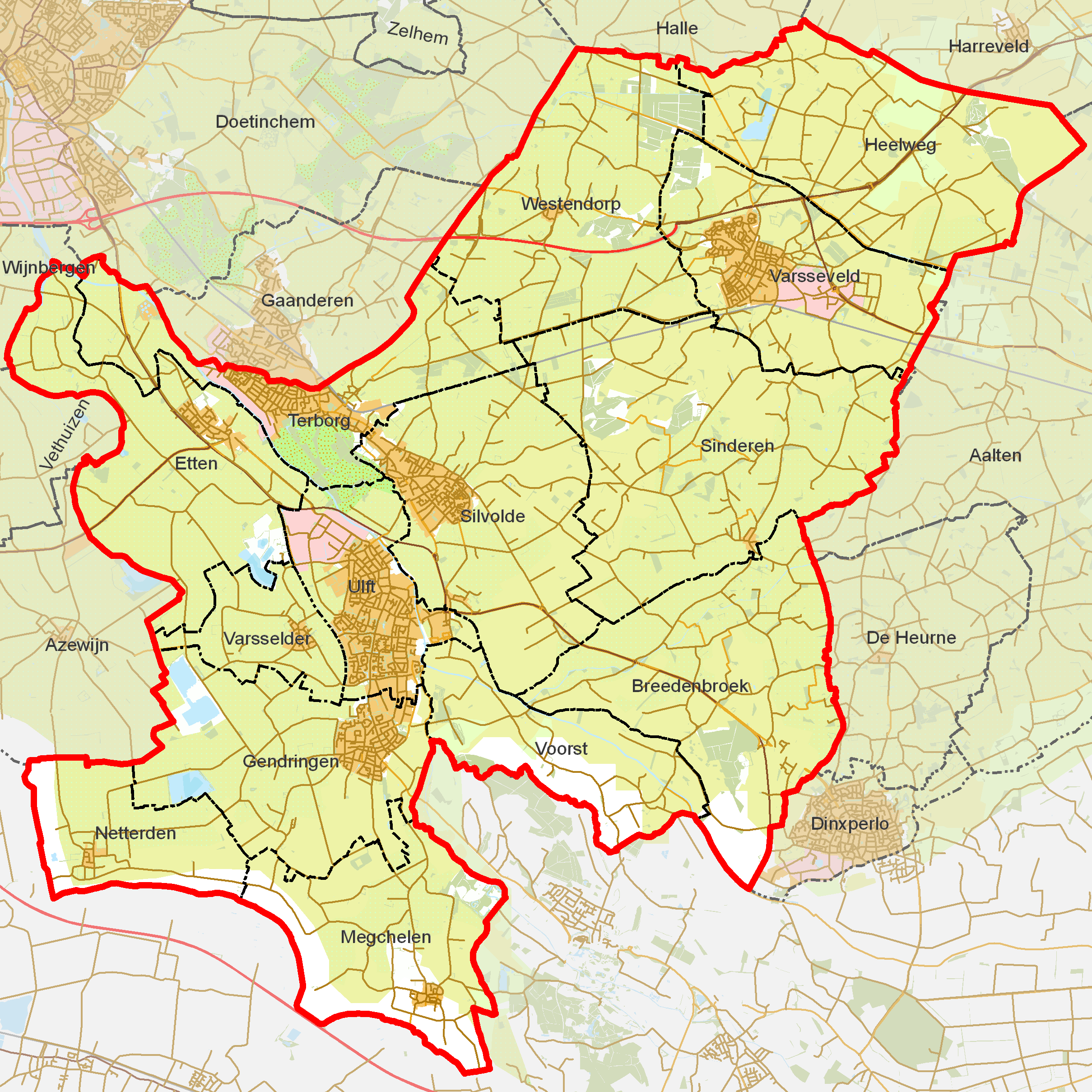 BAG woonplaatsen - Gemeente Oude IJsselstreek.png